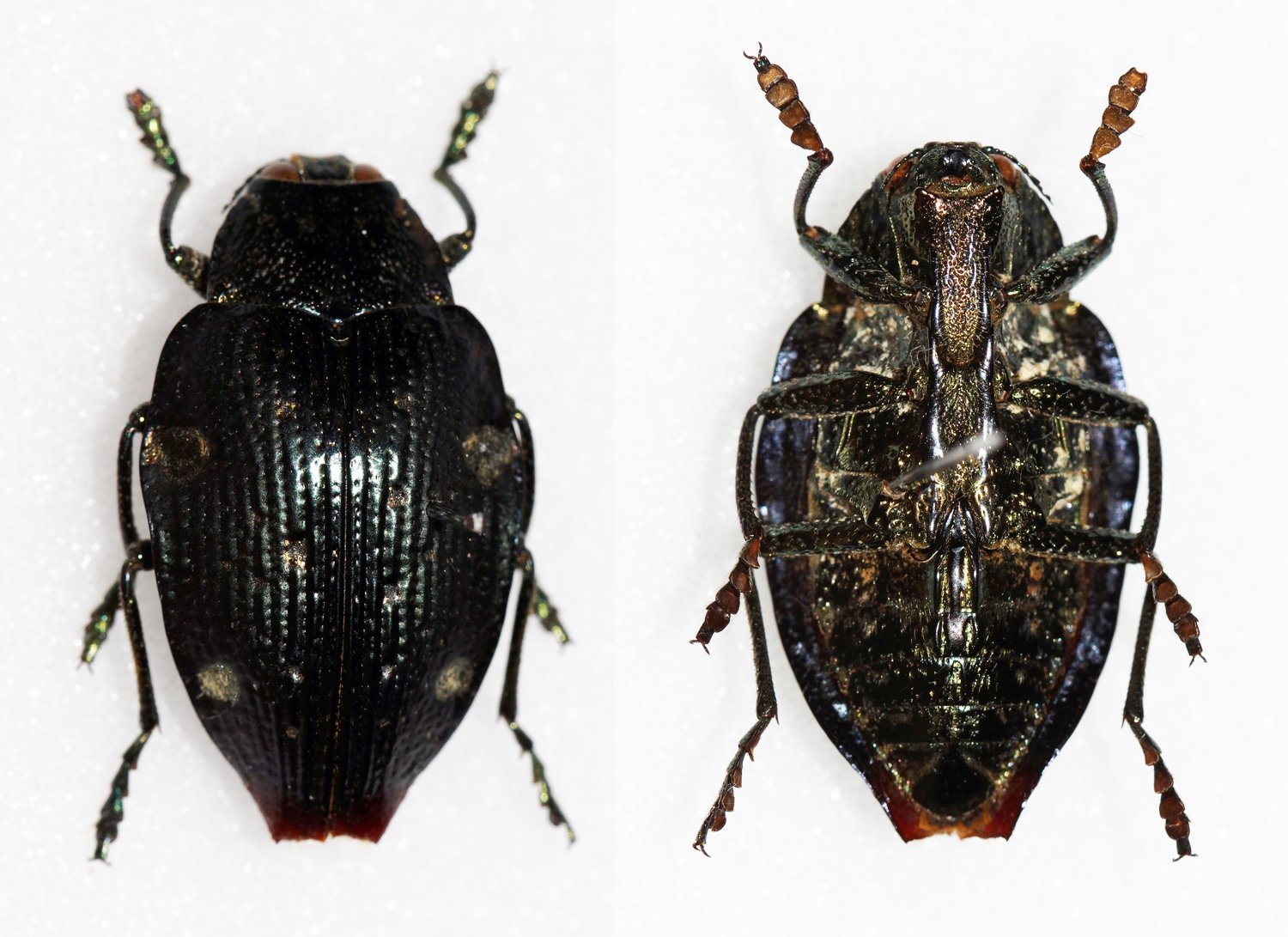 Buprestidae - In collection